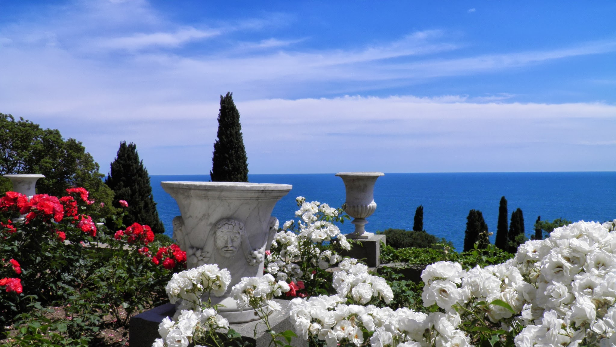 Алупкинський, 98676 м. Ялта, м. Алупка, Шосе Дворцове, 10